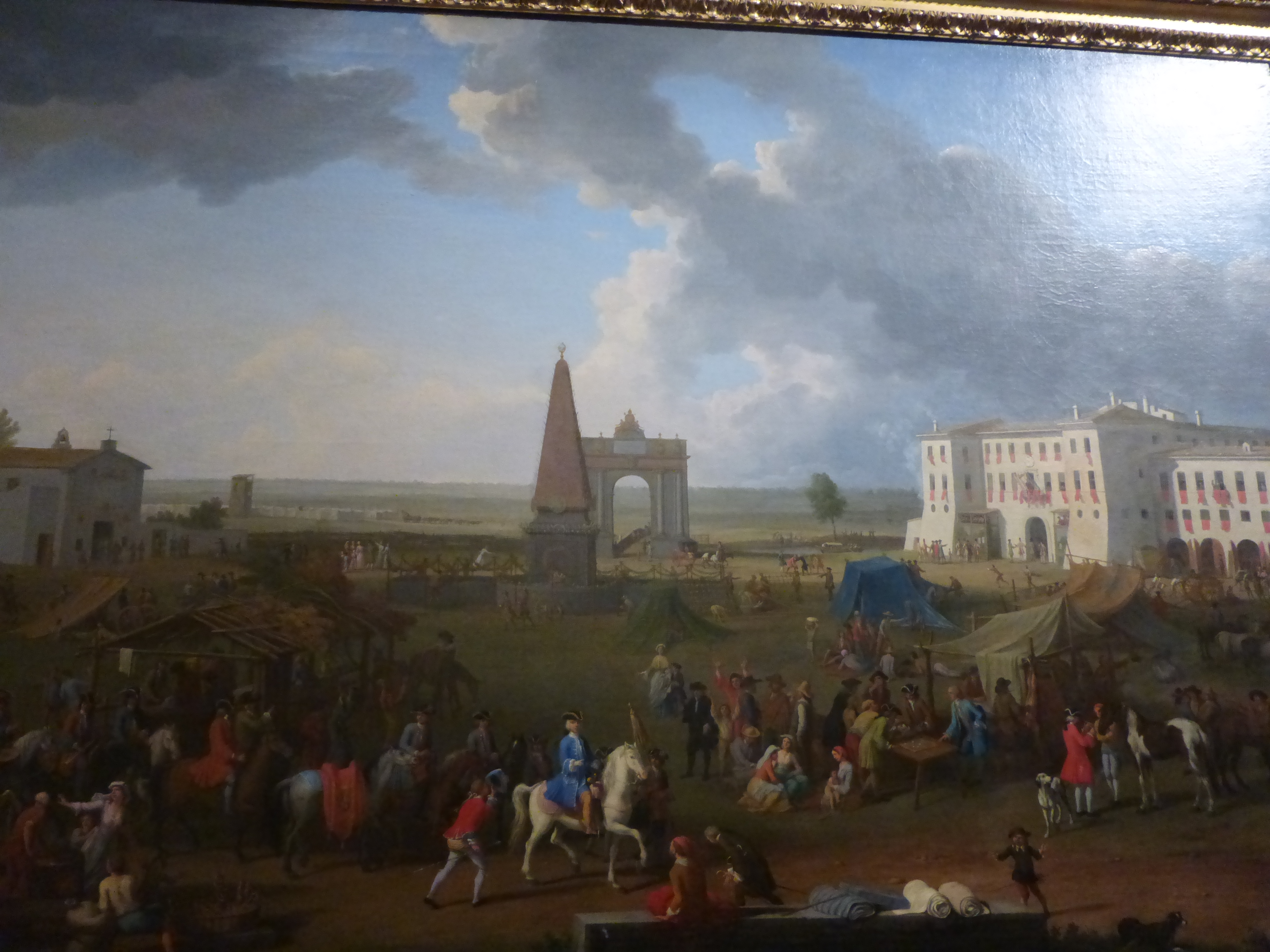 Museo di Roma a Palazzo Braschi. Festa di san Giorgio a Maccarese (tenuta Rospigliosi) per celebrare la ristrutturazione del palazzo e della cappella della tenuta ad opera di Camillo Rospigliosi (fratello di Clemente IX) (Adrien Manglard, 1756).